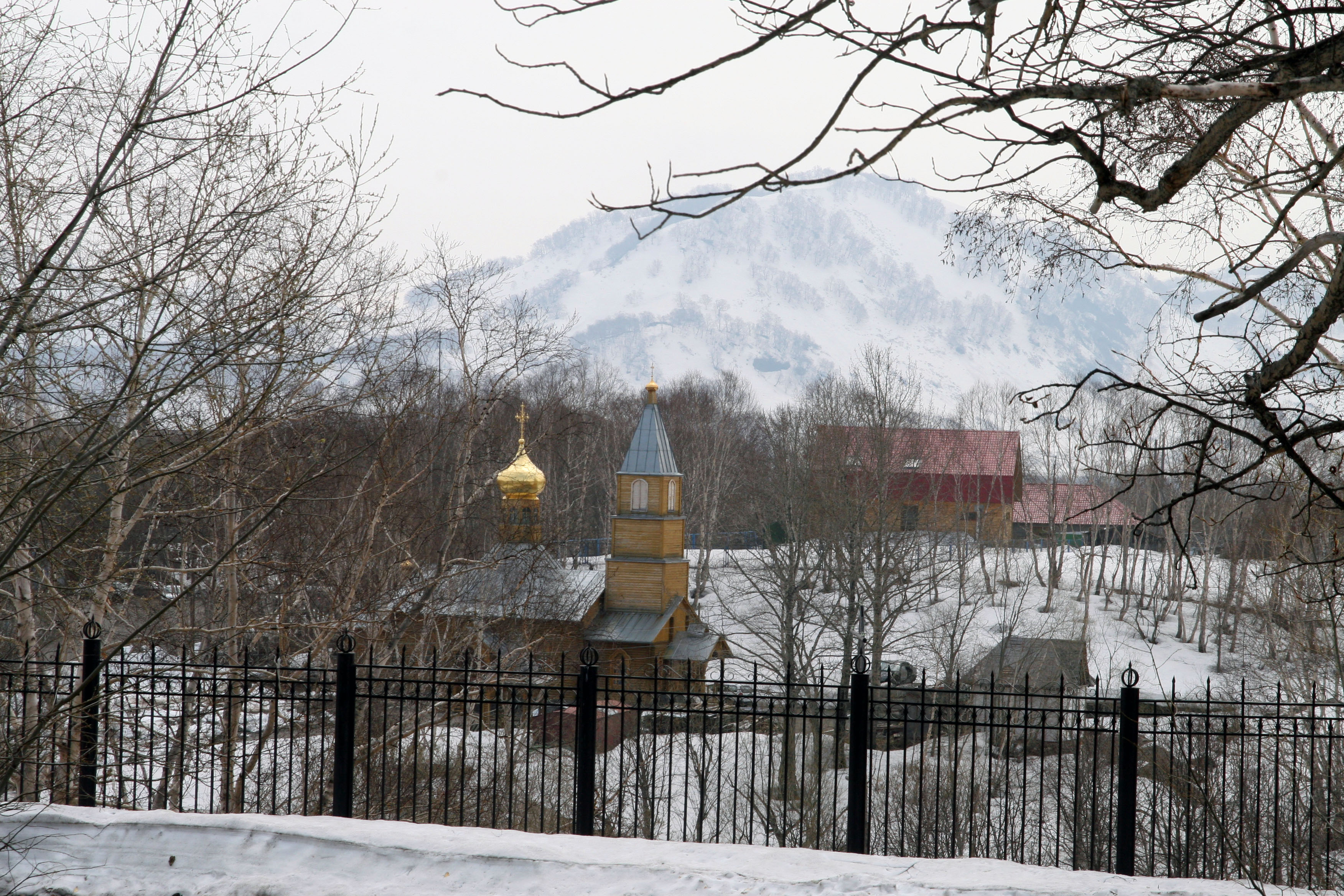 Церковь в Паратунке 52.9621° N, 158.2558° E